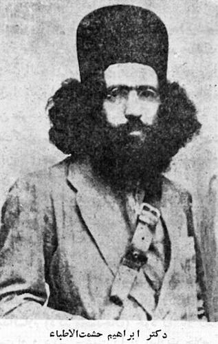 دکتر ابراهیم حشمت طالقانی ملقب به «حشمت الاطباء» و «سردار حشمت» فرزند عباسقلی بود.